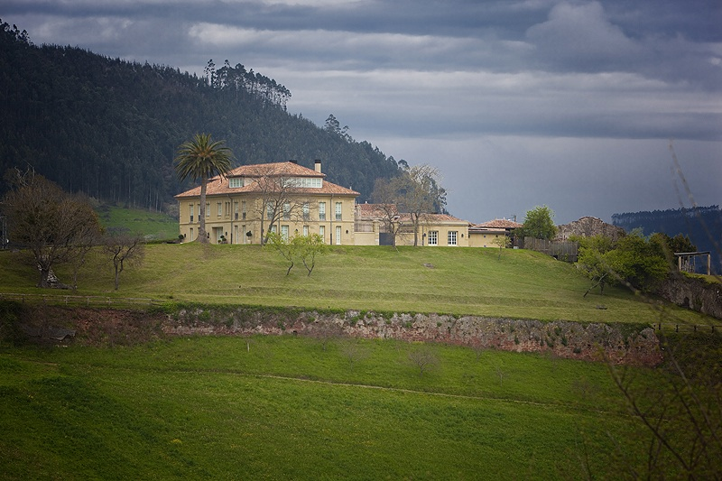 Principado de Asturias